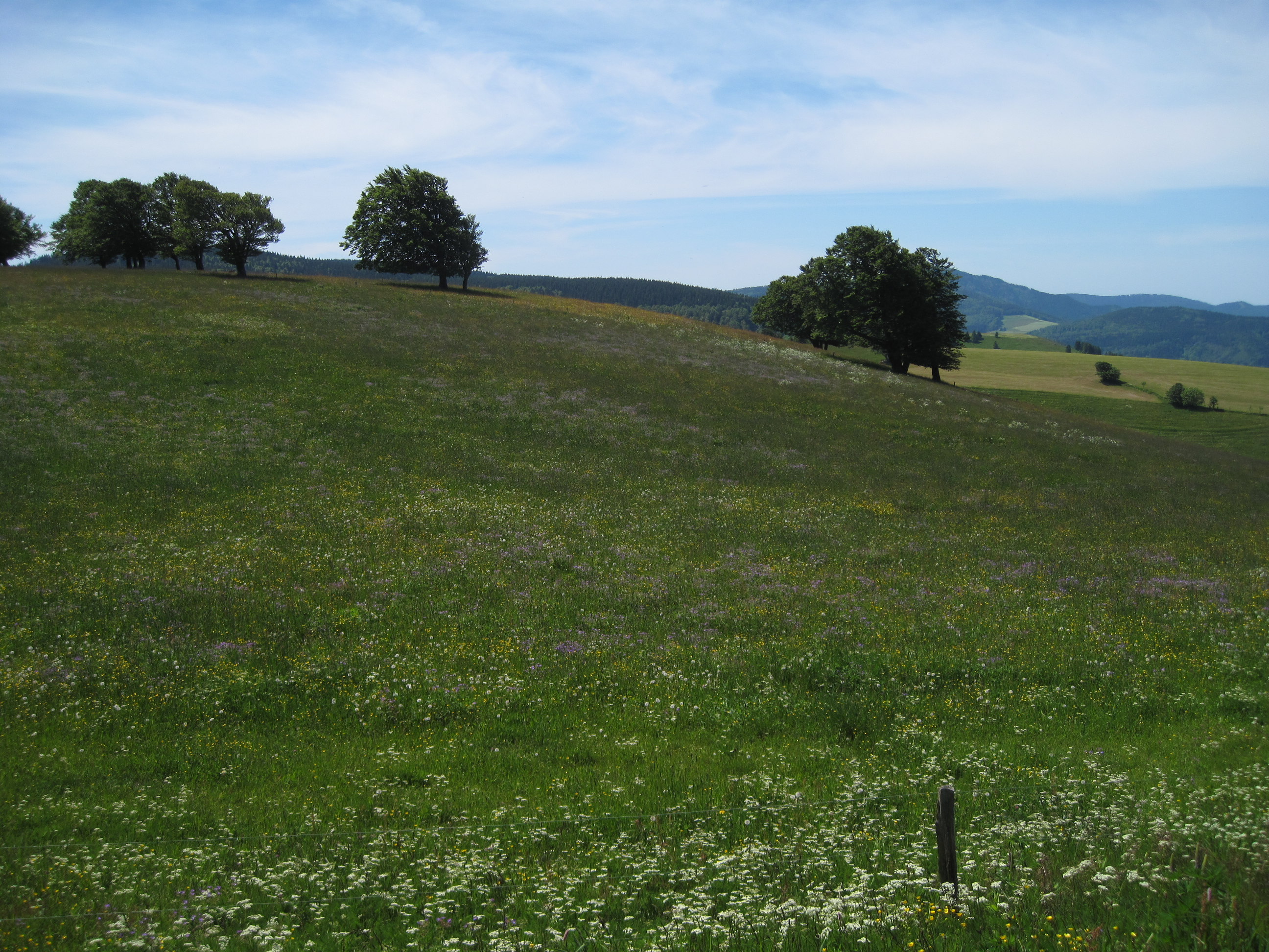 Schauinsland. Blick von der Kreuzung L124/K4958 Richtung Süden. Mittig im Bild Windflüchterbäume (Rotbuchen). Naturschutzgebiet (NSG-Nummer 3.264) im Naturraum Hochschwarzwald.